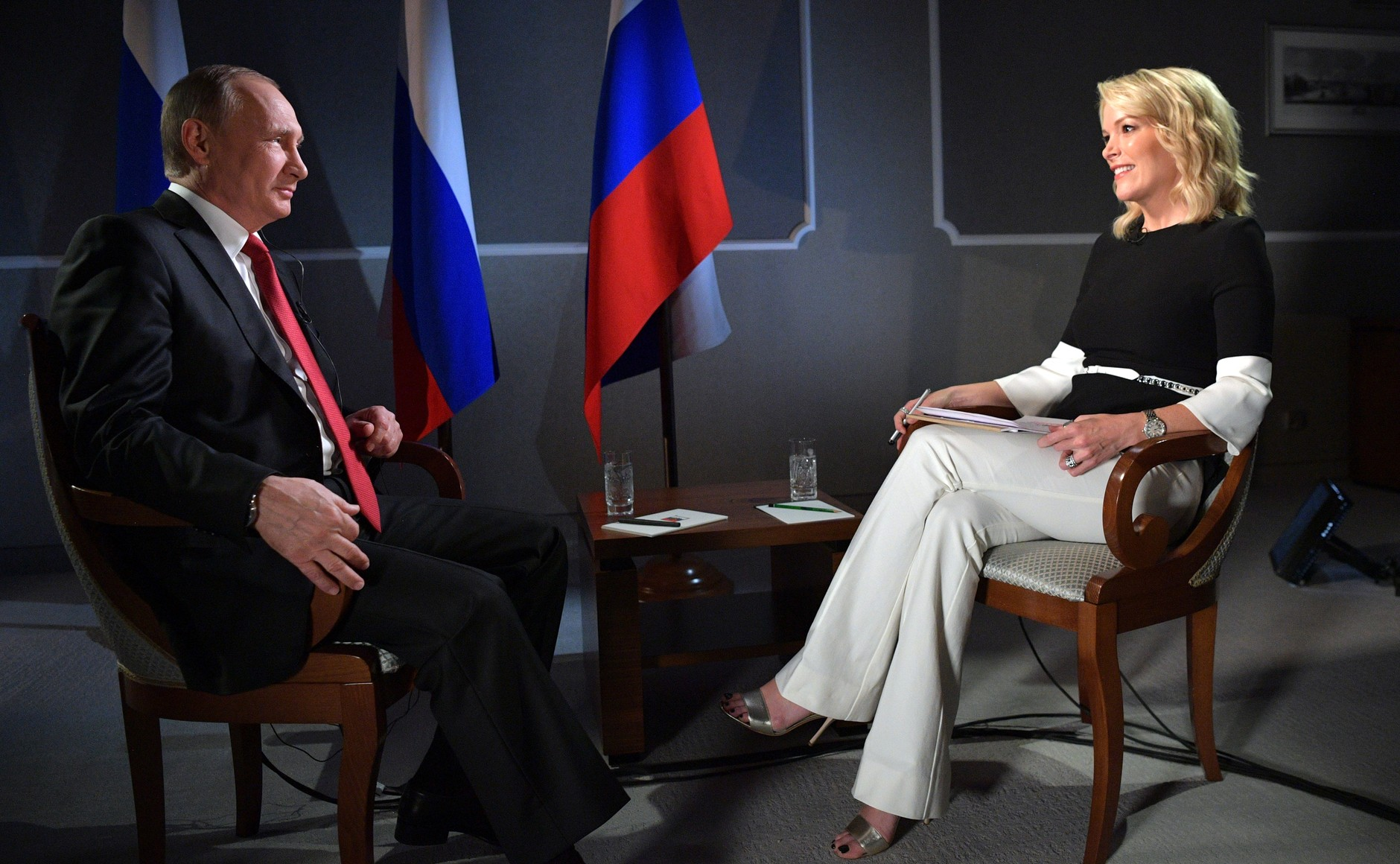 Президент России Владимир Путин ответчает на вопросы журналиста американского телеканала NBC News Мегин Келли